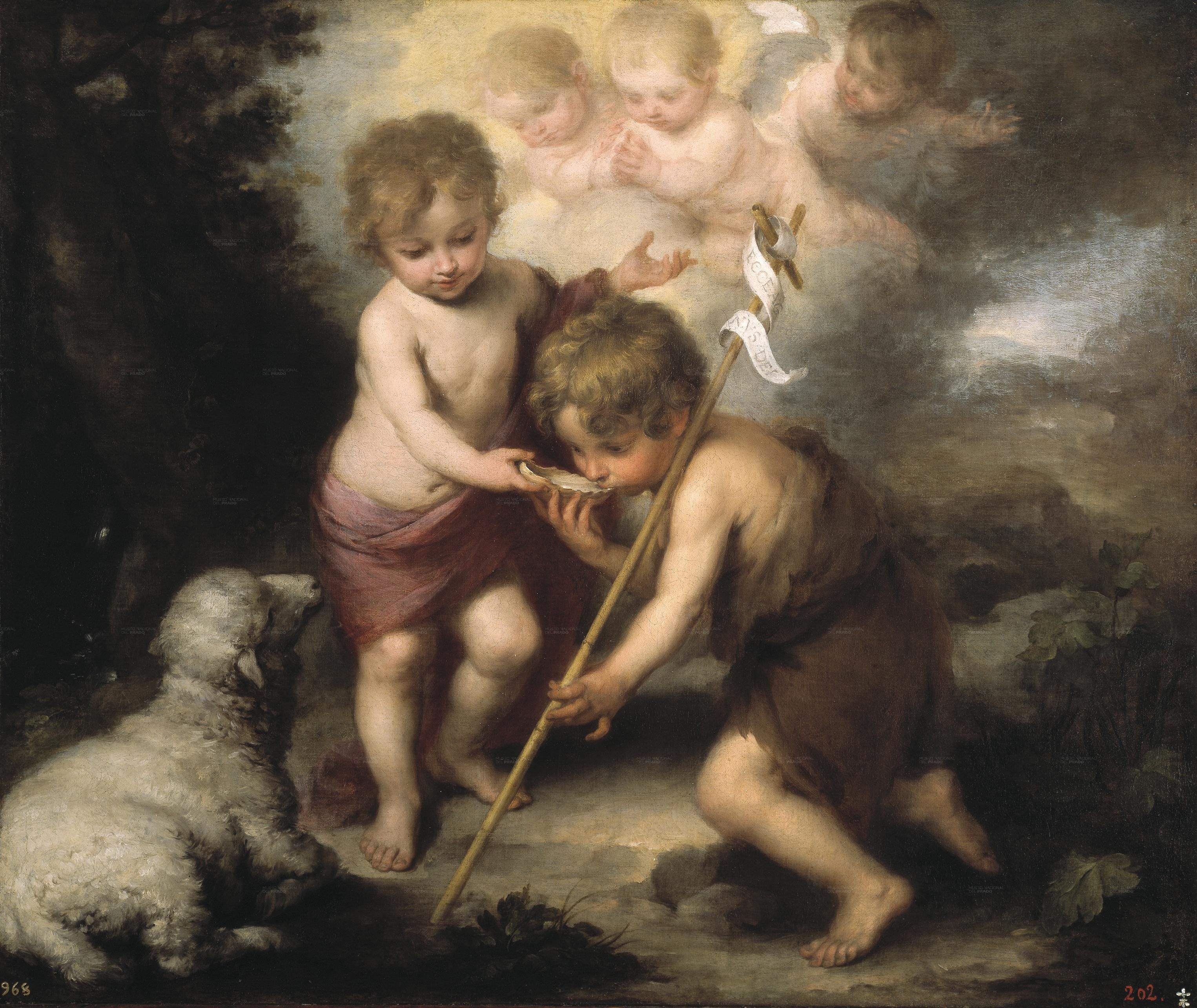 La obra representa al Niño Jesús dando de beber agua en una concha a su primo, el profeta San Juan Bautista.